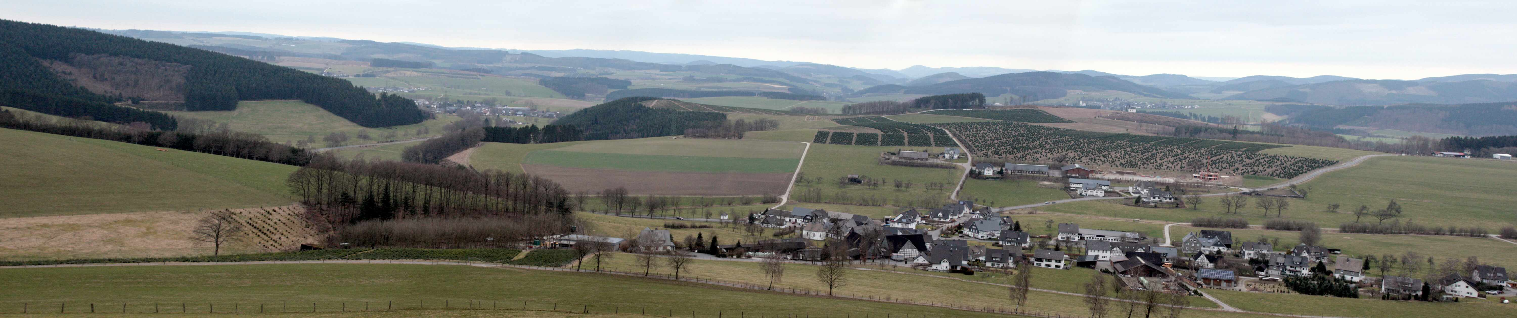 Schmallenberg Werpe, Panorama